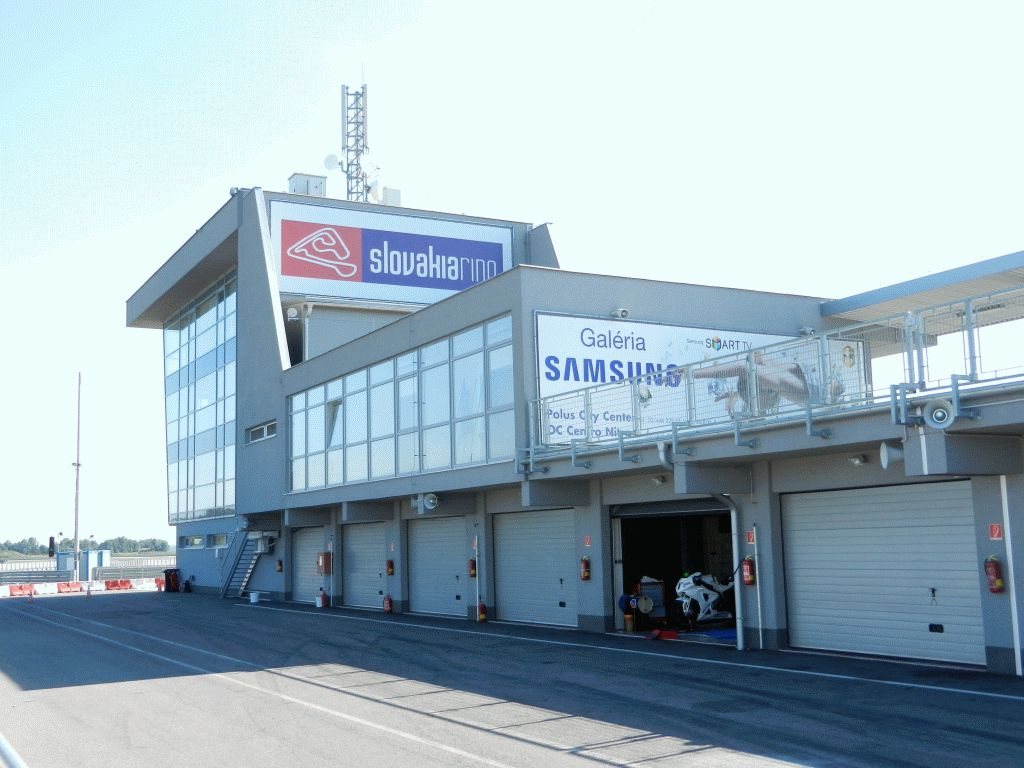 Slovakiaring, in Orechová Potôň, Dunajská Streda District in Slovakia